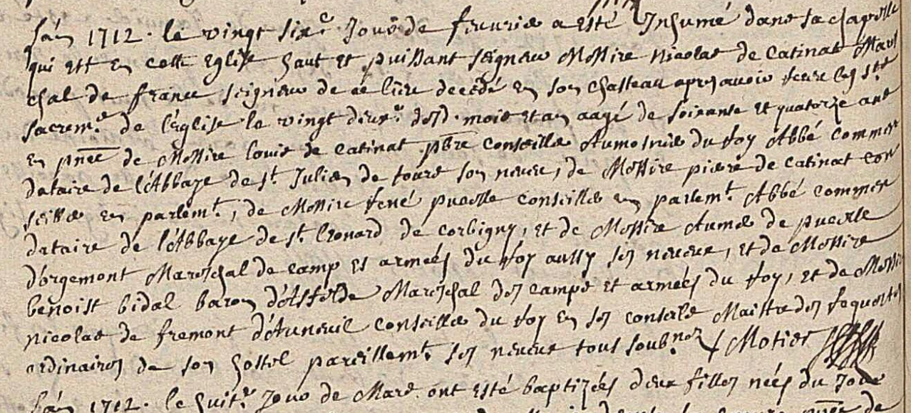 Acte de sépulture du Maréchal Nicolas de Catinat, mort le 22 février 1712 et inhumé le 26 février 1712 en l'église Saint-Gratien de Saint-Gratien, paroisse alors située dans le diocèse de Paris.